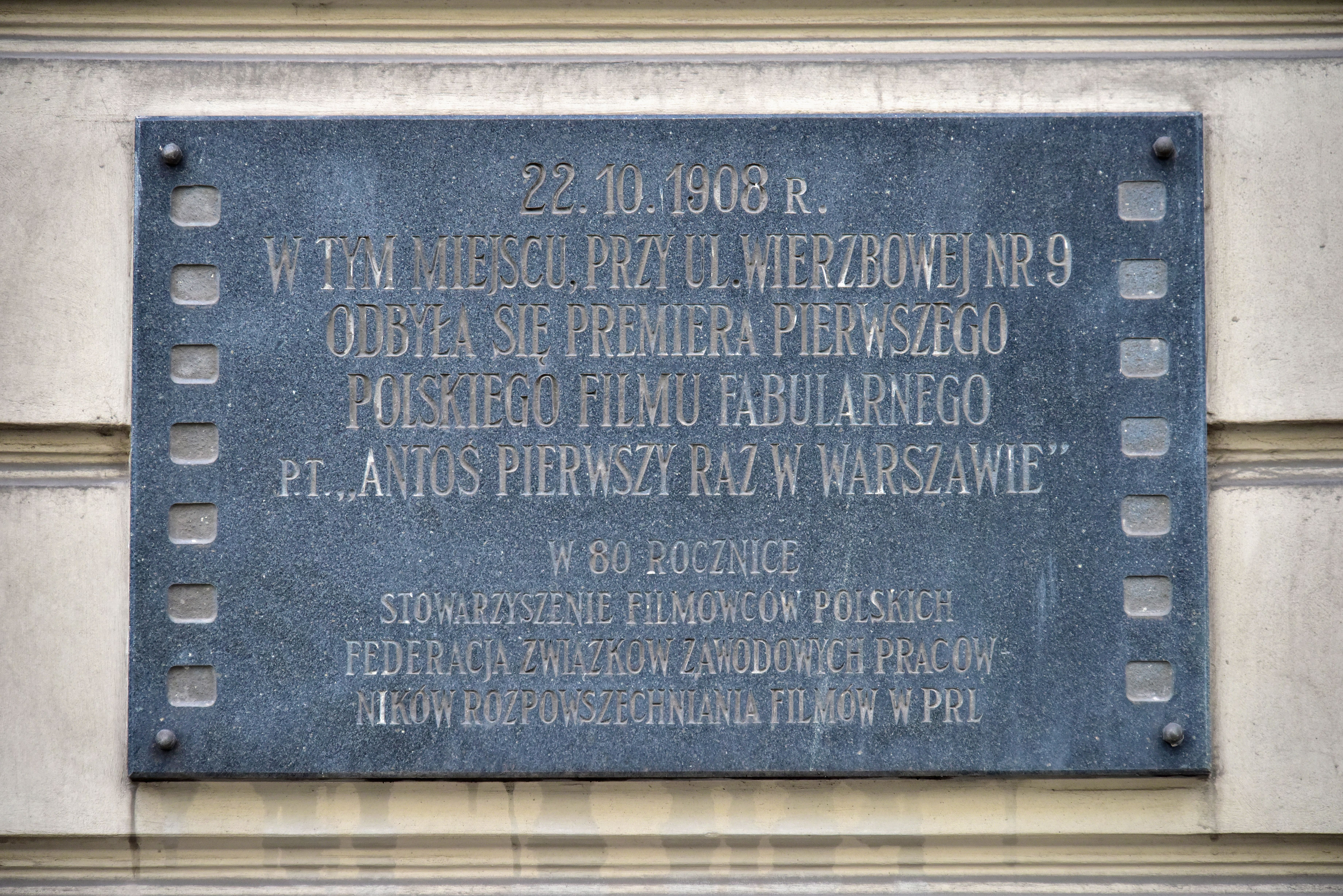 Tablica upamiętniająca premierę pierwszego polskiego filmu fabularnego Antoś pierwszy raz w Warszawie przy ul. Wierzbowej 5/7 w Warszawie